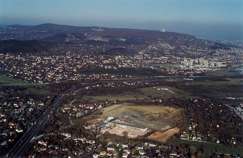 Törökbálint, Hungary, aerialphotgraphy